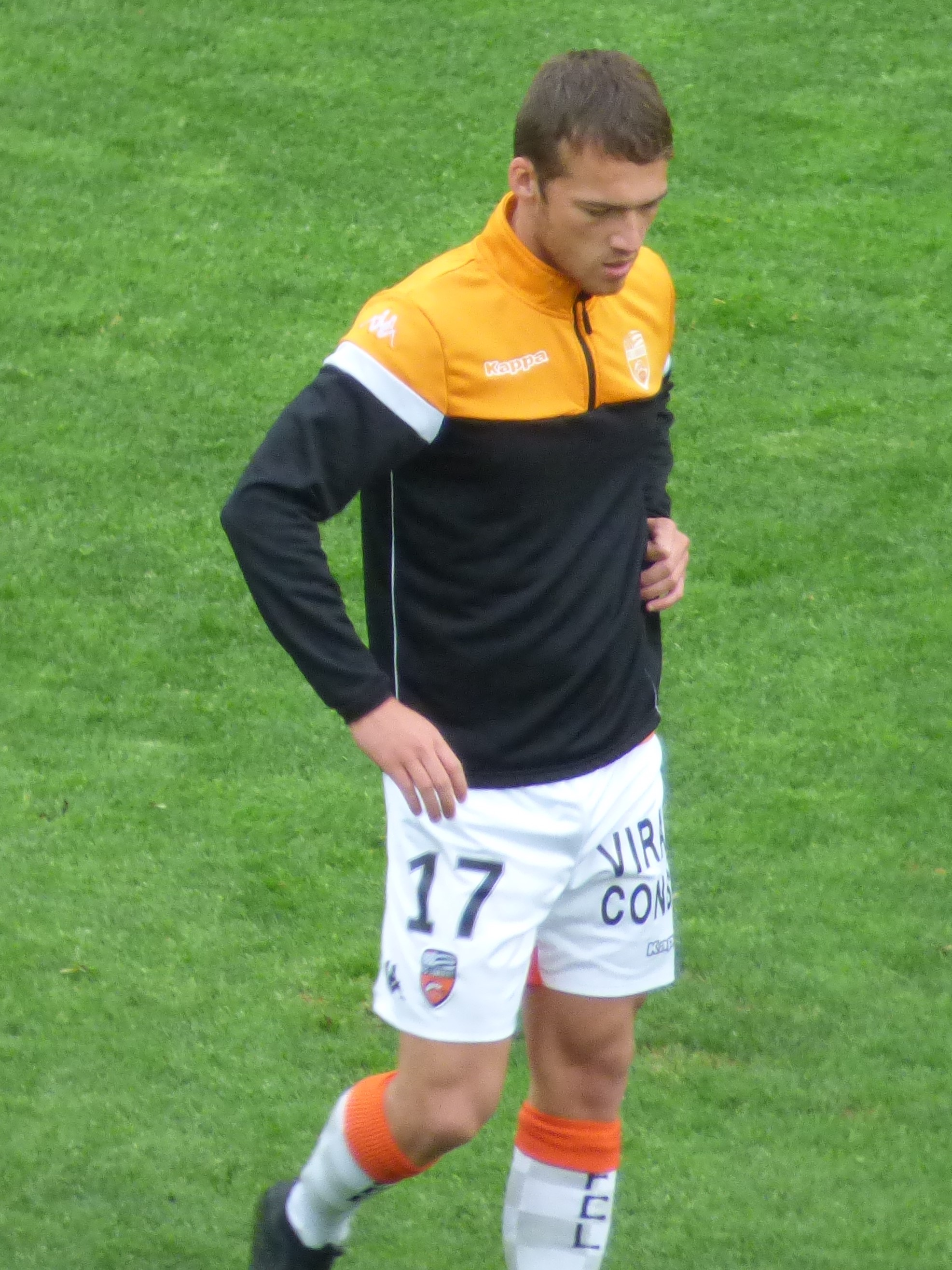 Maxime Etuin avant le match RC Lens / FC Lorient, comptant pour la 34ème journée du championnat de France de Ligue 2 de football 2018-2019, le 23 avril 2019, au Stade Bollaert-Delelis.